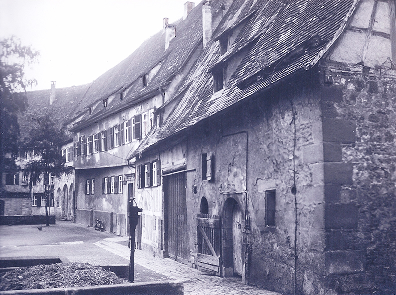 1967 abgerissener Gebäudetrakt des Heilig-Geist-Spitals in Markgröningen